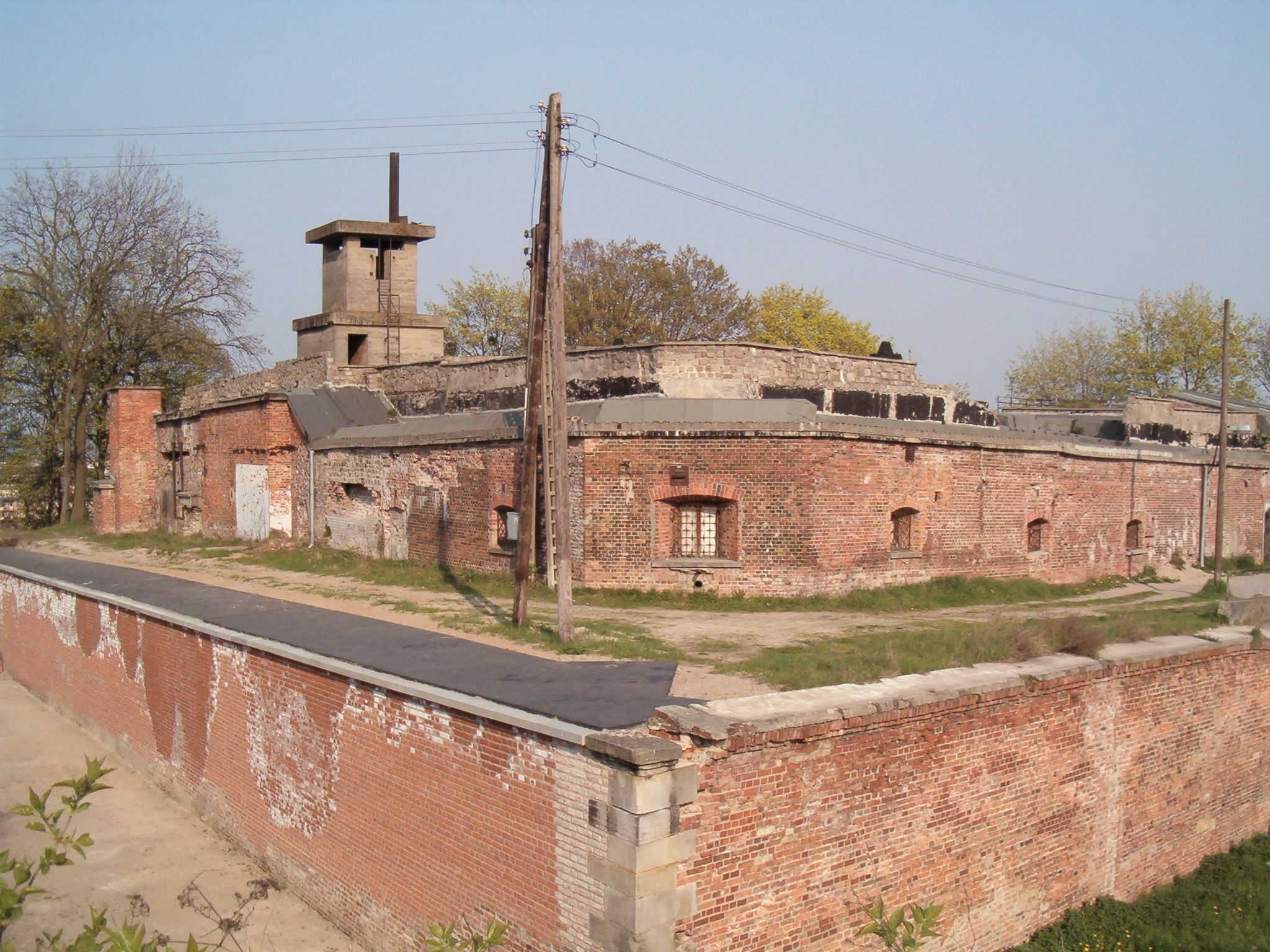 Redita Napoleońska na Grodzisku w Gdańsku